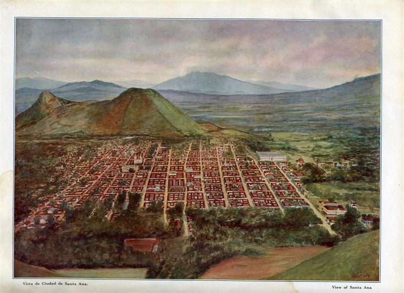 Vista panorámica de la ciudad salvadoreña de Santa Ana en 1916.